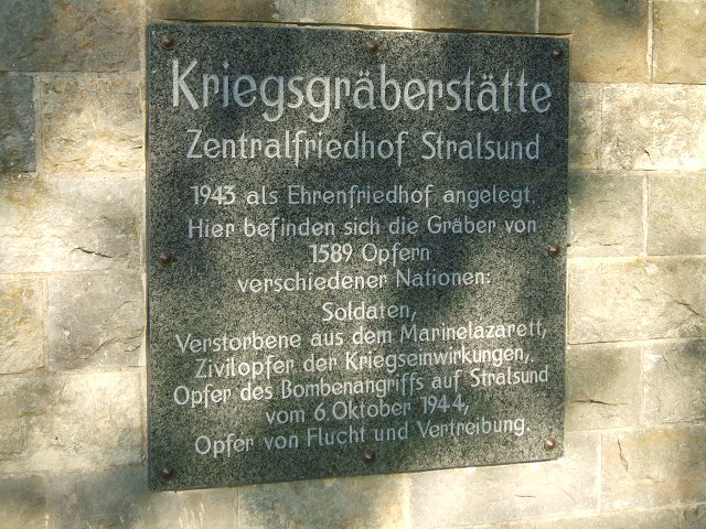 Stralsund,_Germany,_Zentralfriedhof,_Kriegsgräberstätte,_Platte_(2006-09-25)